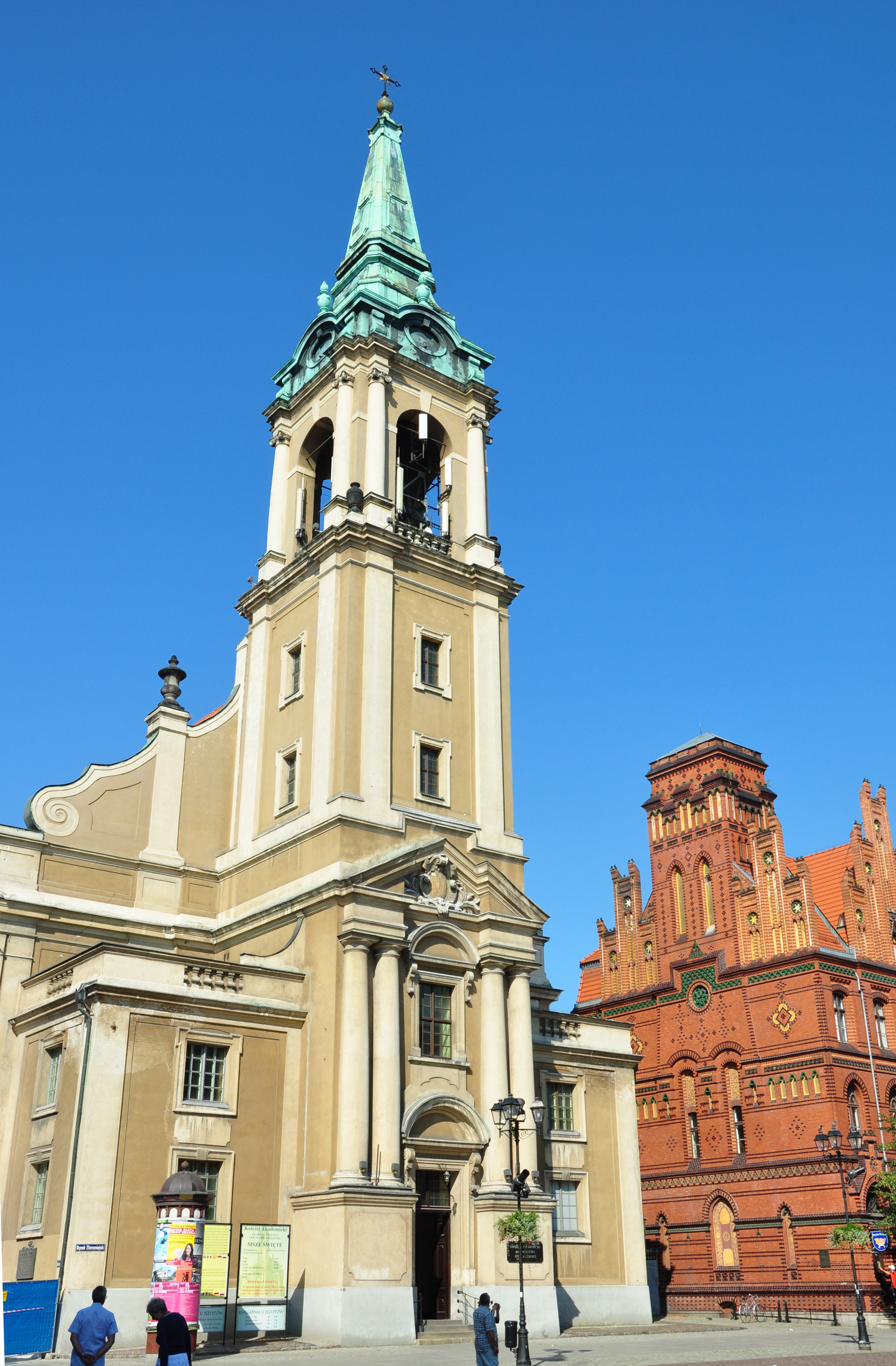 Toruń - kościół św. Ducha, Rynek Staromiejski 14